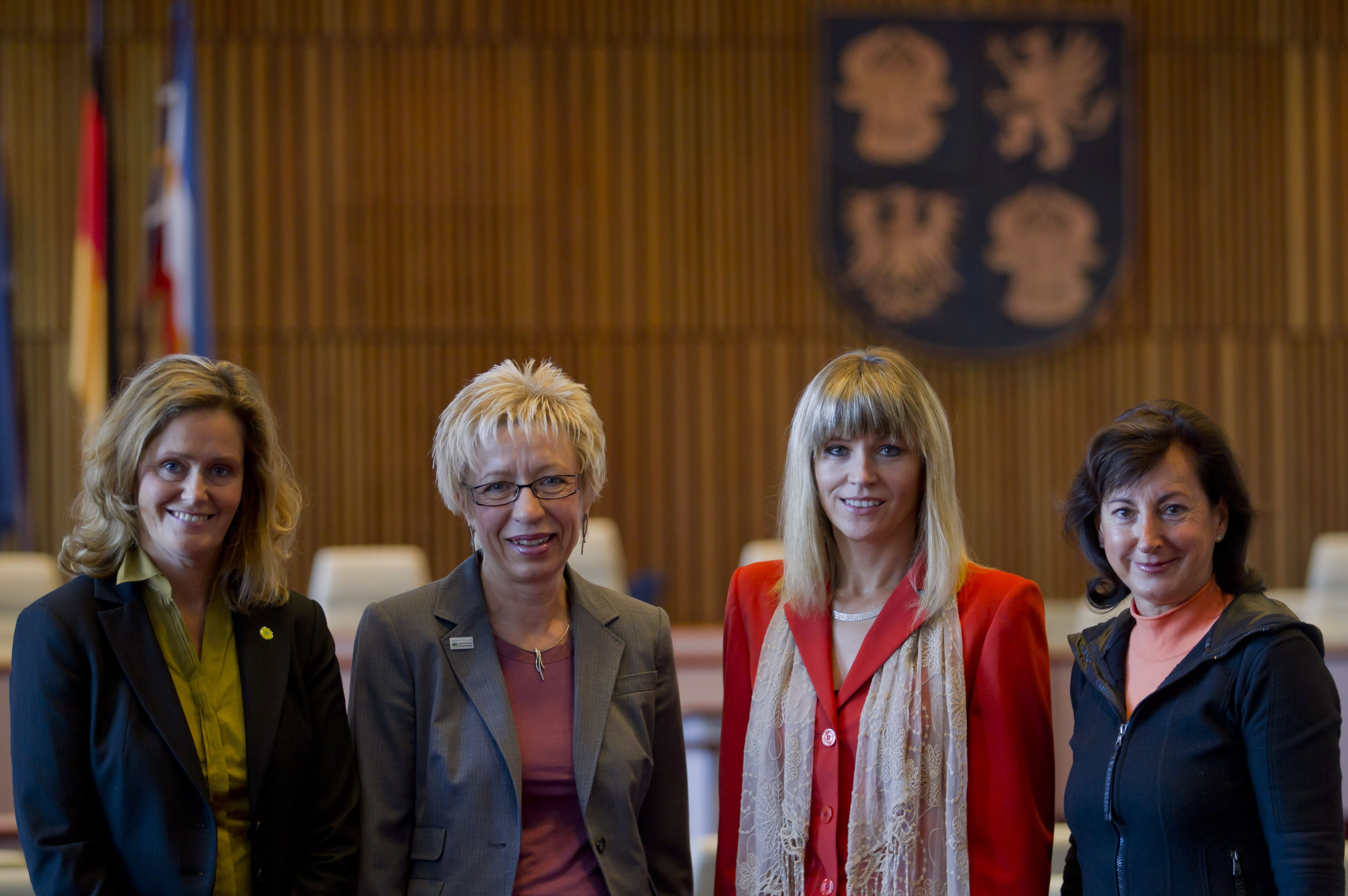 Präsidium des Landtages Mecklenburg-Vorpommern: Vizepräsidentin Silke Gajek (BÜNDNIS 90 / Die Grünen), Landtagspräsidentin Sylvia Bretschneider (SPD), Vizepräsidentin Beate Schlupp (CDU),Vizepräsidentin Regine Lück (Die Linke) (v.l.n.r.)